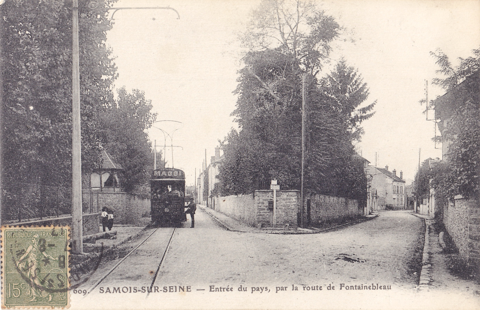 Carte postale ancienne sans mention d'éditeur, n°609 :SAMOIS-SUR-SEINE - Entrée du Pays, par la route de Fontainebleau